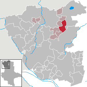 (Original text: Fleetmark im Altmarkkreis Salzwedel)